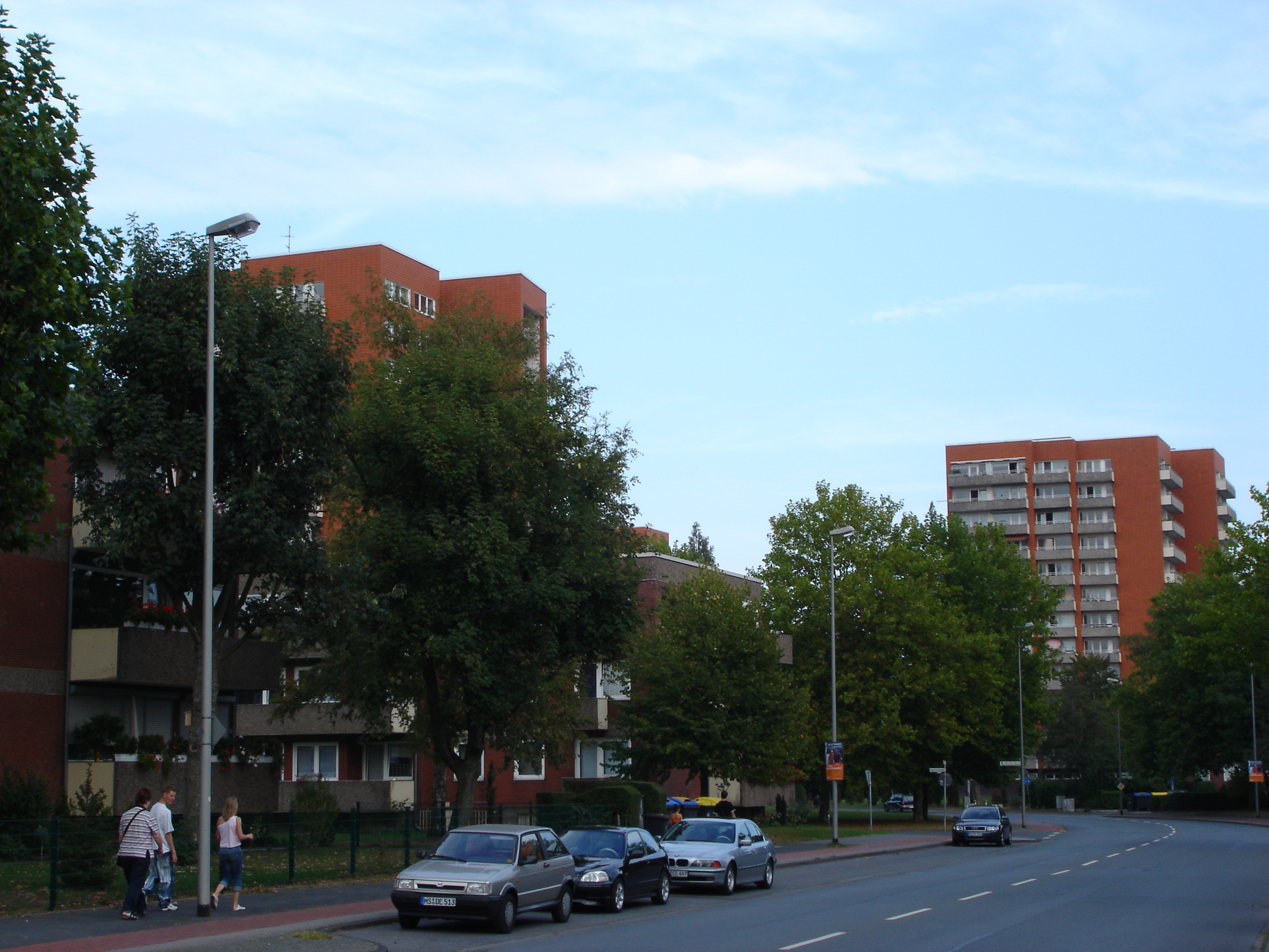 Panorama der Königsberger Straße in Coerde, Münster, Deutschland